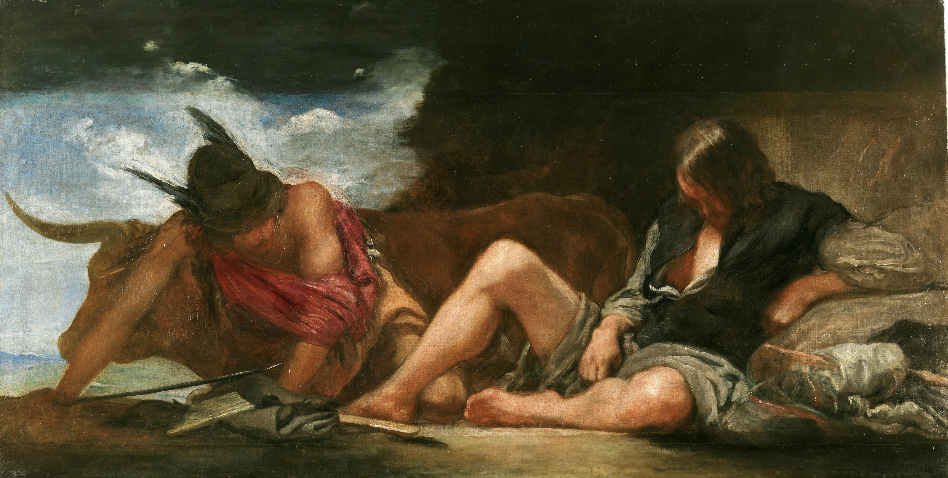 La obra representa al dios Mercurio junto a Argos, y es una de las obras de temática mitológica de Diego Velázquez conservadas en el Museo del Prado.